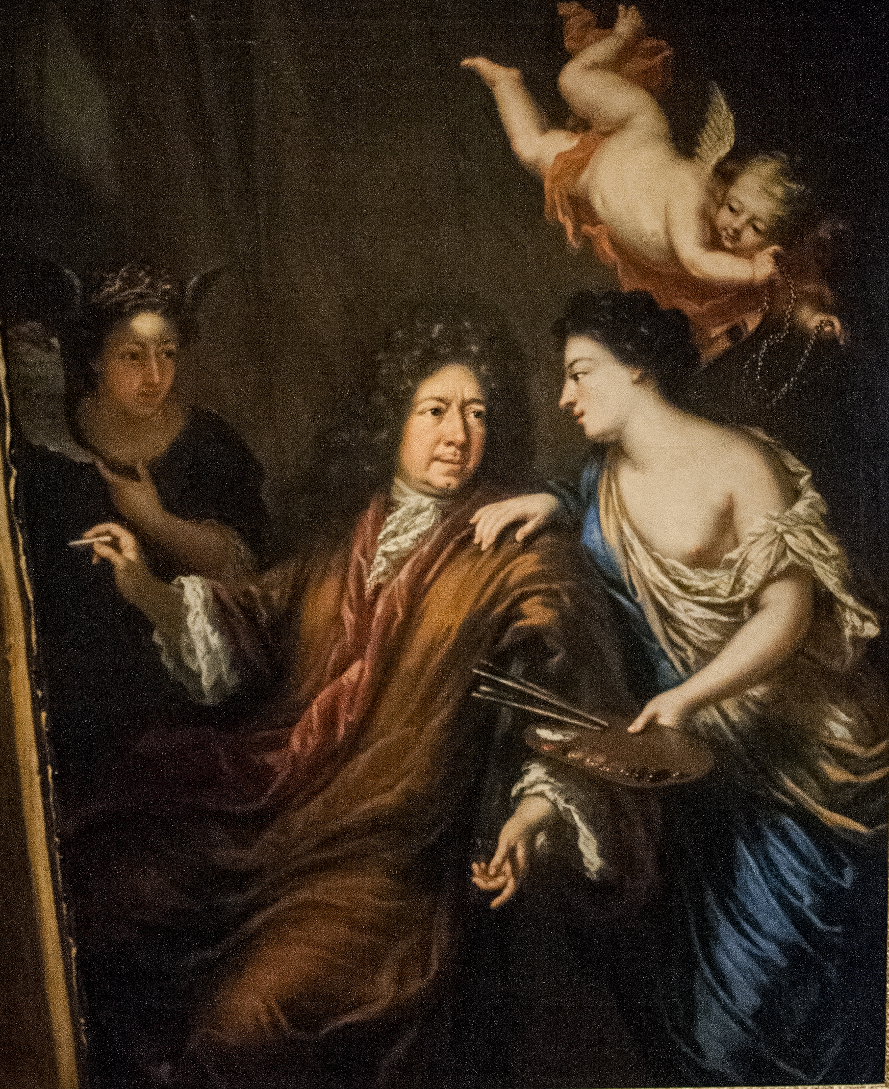 Konstnären själv i mitten med allongeperuk, med krita håller han på att skissa upp ett nytt motiv på duken i bildkanten. På hans vänstra sida står Pictura (Måleriet) med blottat bröst som en anspelning på målarkonstens fruktbarhet; med ena handen sträcker hon fram palett och penslar till konstnären, den andra handen på hans axel som uppmuntran till nya verk. På hans högra sida står Inventio (Fantasin) i en huvudbonad med vingar som symboliserar konstnärskapets upphöjda strävan; hon håller fram ett papper med text på latin som beskriver en hovmålares uppgift: "Att måla majestäternas odödliga berömmelse". Tavlan är förmodligen beställd av Hedvig Eleonora, åtminstone har den hängt i hennes audiensrum på Drottningholm.